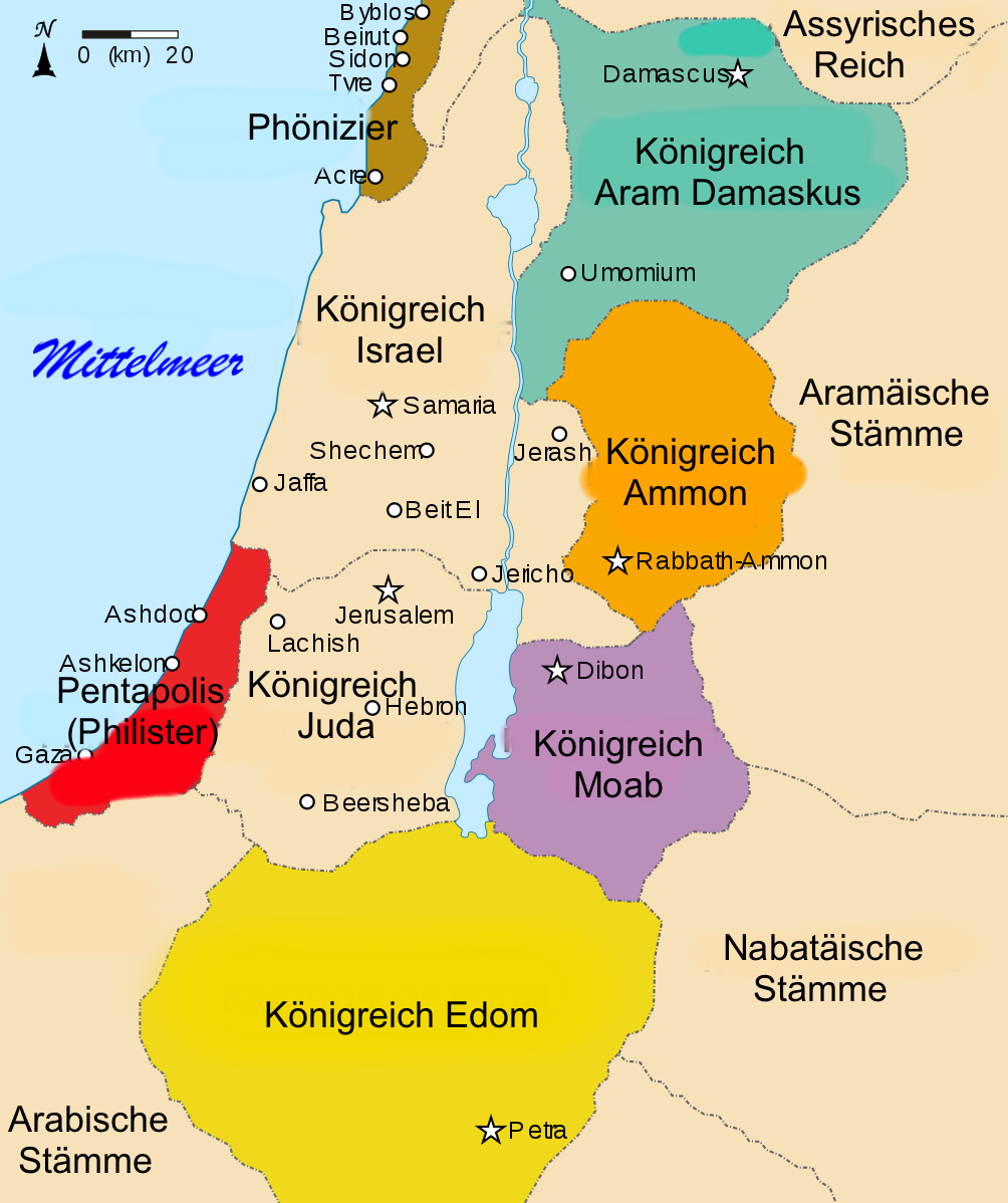 Israel umgebende Gebiete 830 v. Chr.